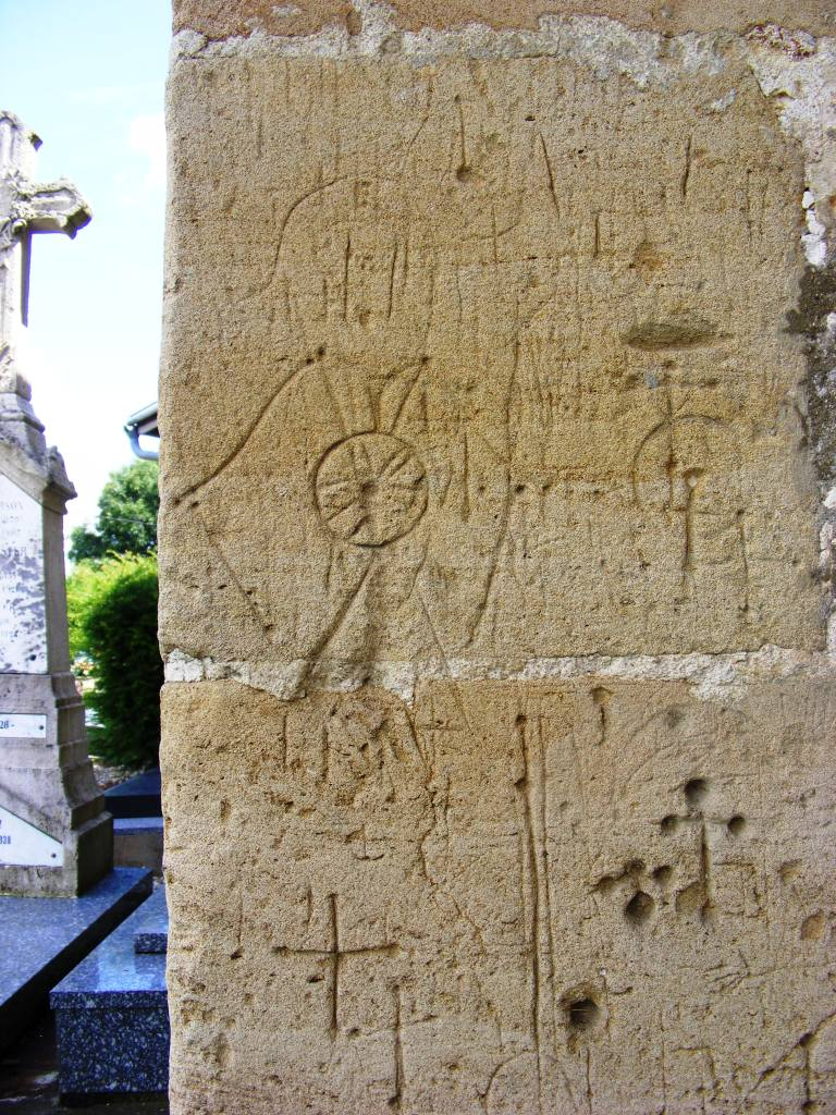 Graffiti Révolutionnaire.